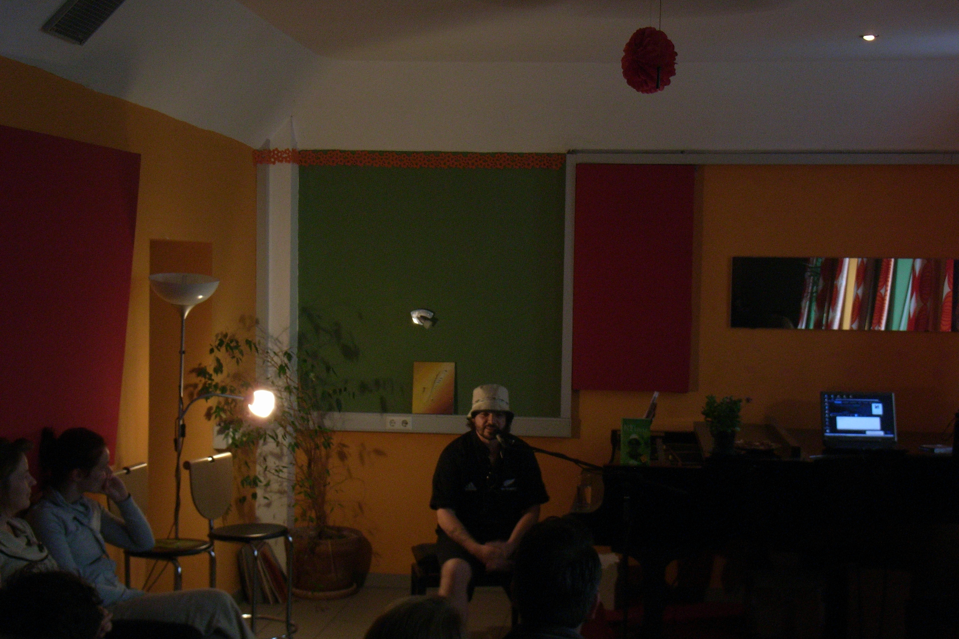 Ingo Petz bei einer Lesung im salon de jazz am 9. Juli 2009 in Köln